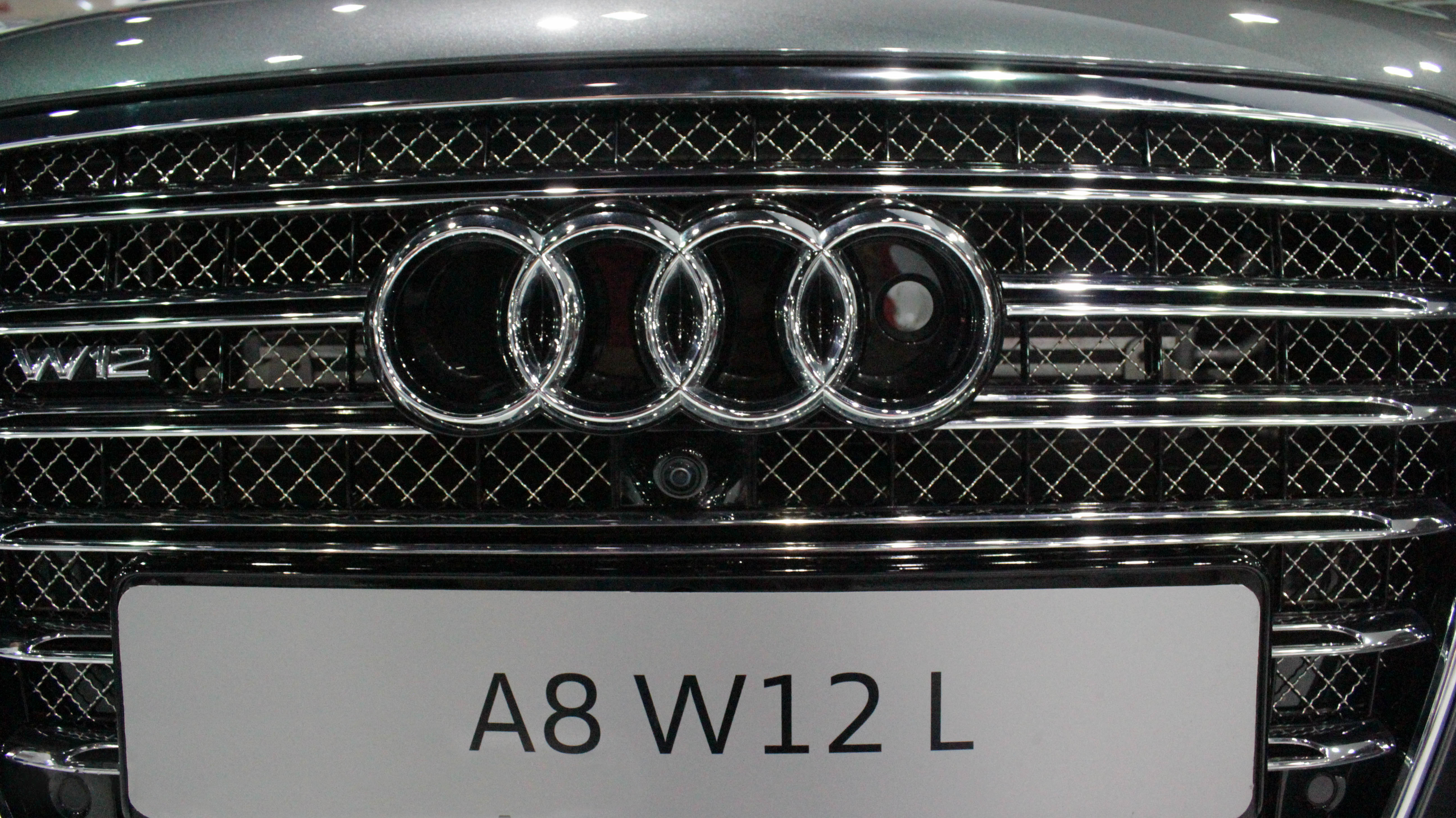 Audi A8 W12 L